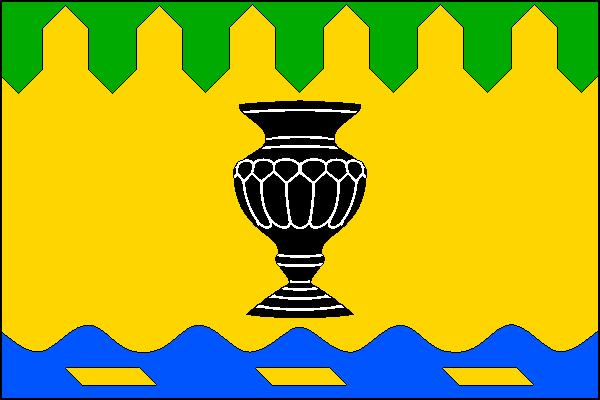 Vlajka obce Pohorská Ves